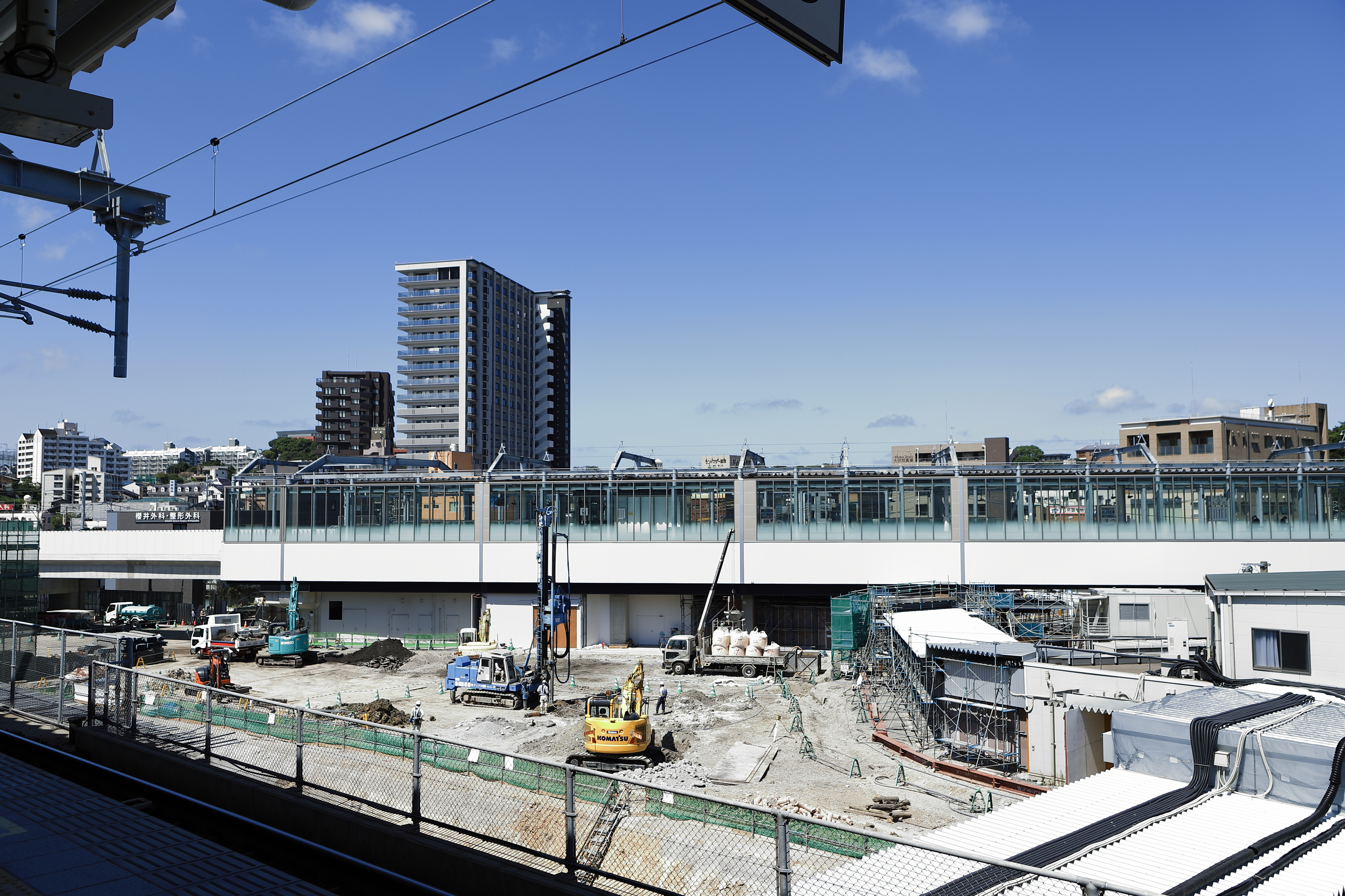 連続立体交差事業に伴う工事が進む折尾駅。5番乗り場より2019年9月16日撮影。